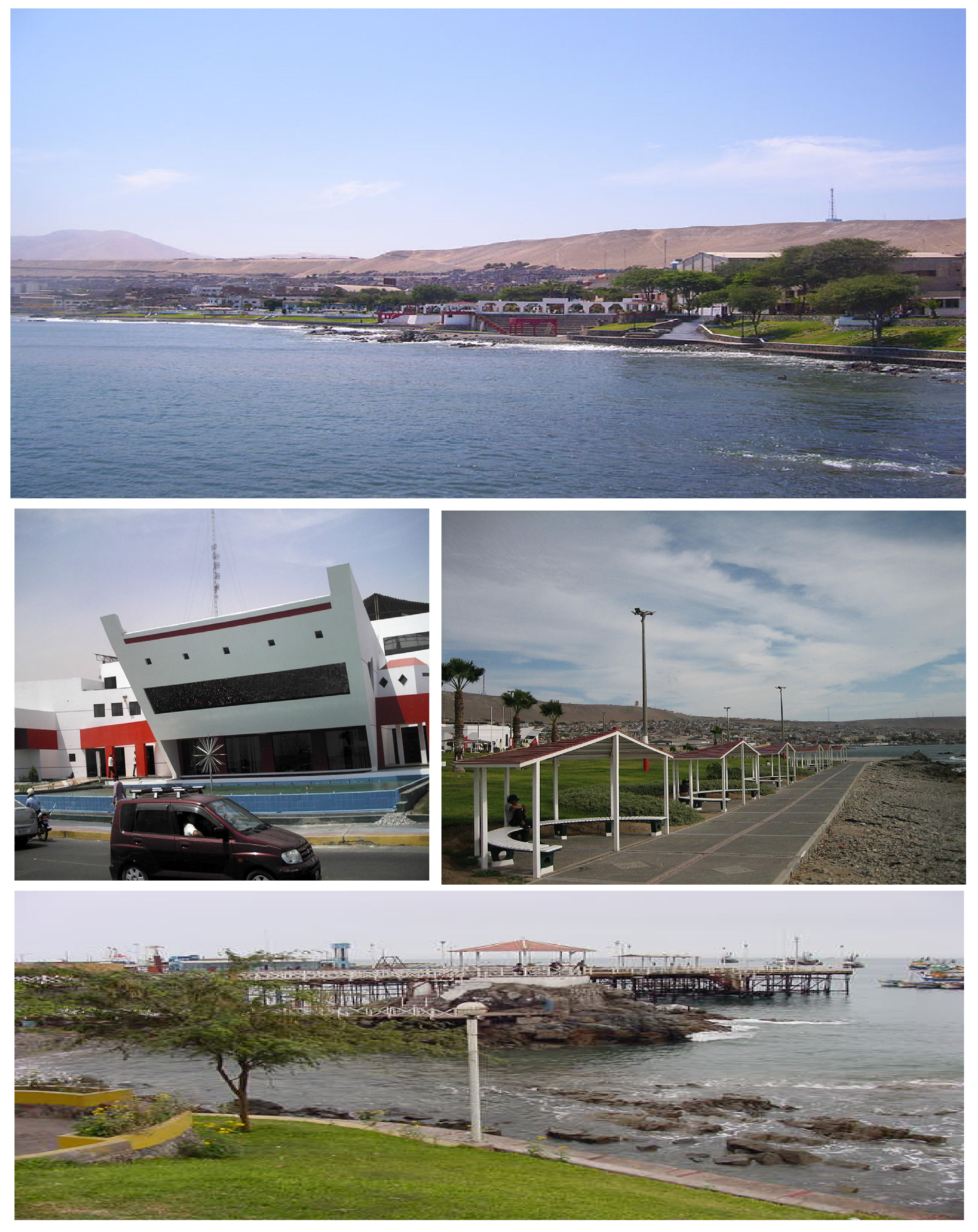 Collage de Ilo ciudad ubicada al sur del Perú